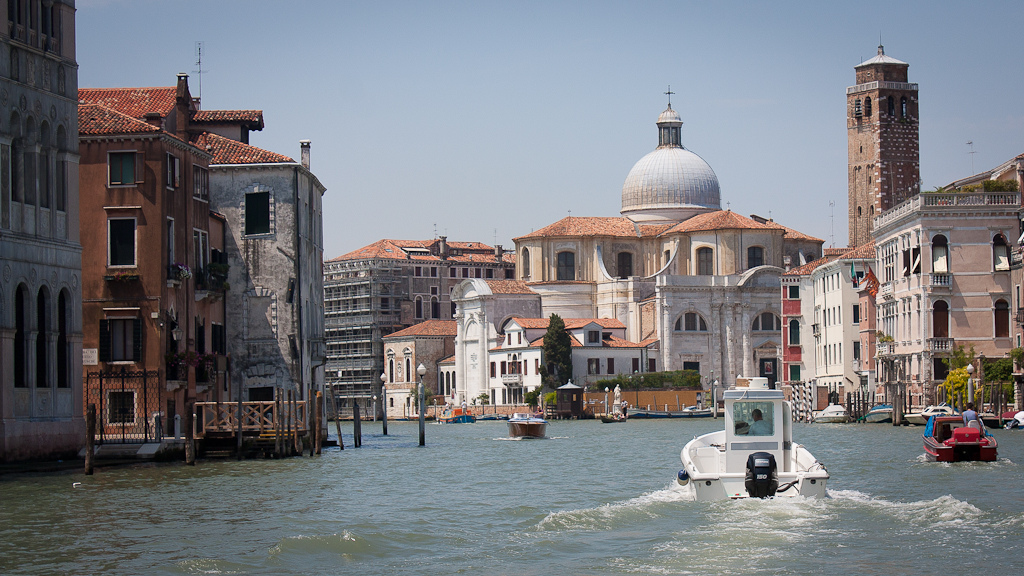 Venice